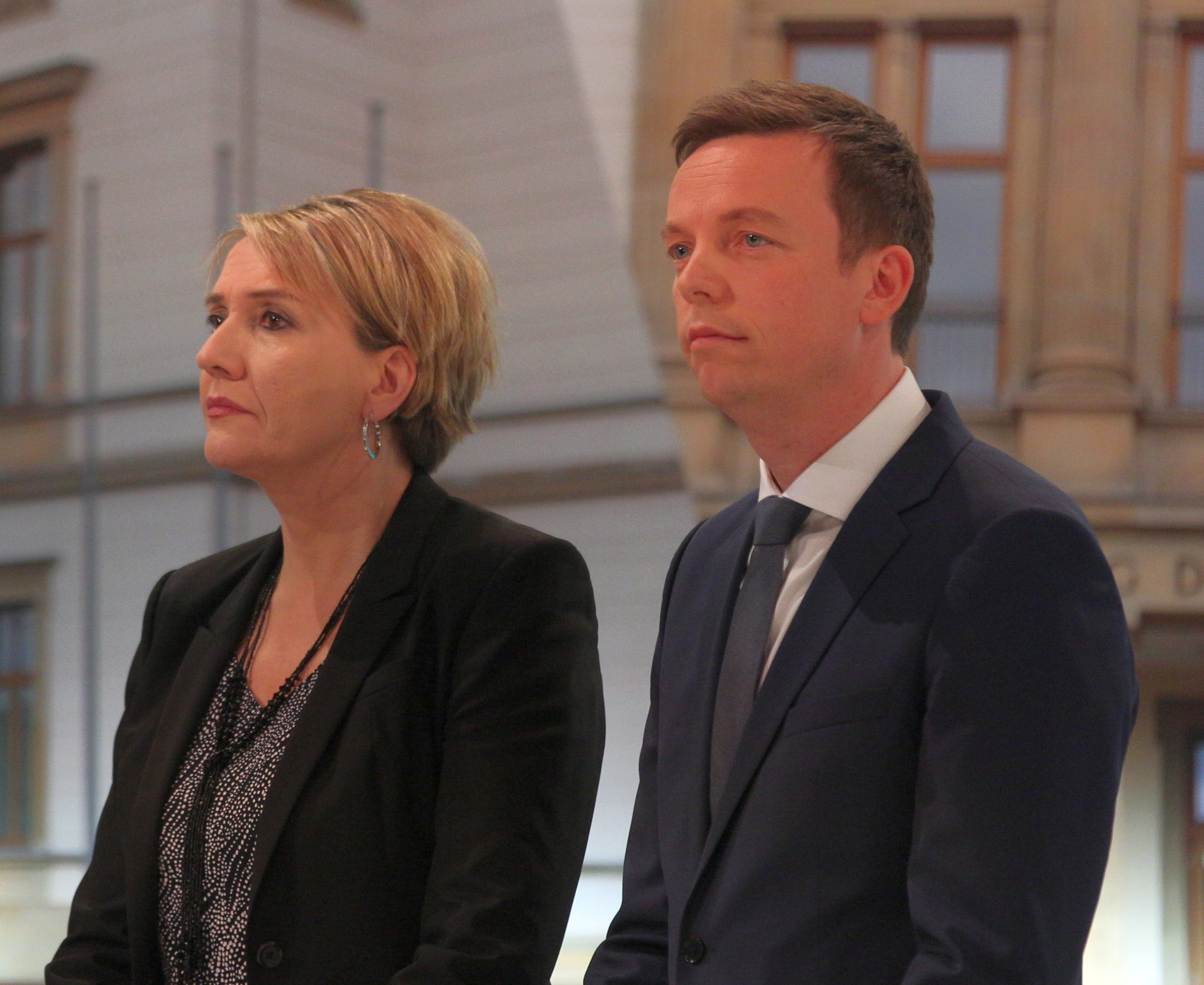 Simone Peter (Bündnis 90/Die Grünen) und Tobias Hans (CDU) im ARD-Wahlstudio beim Wahlabend zur Landtagswahl im Saarland